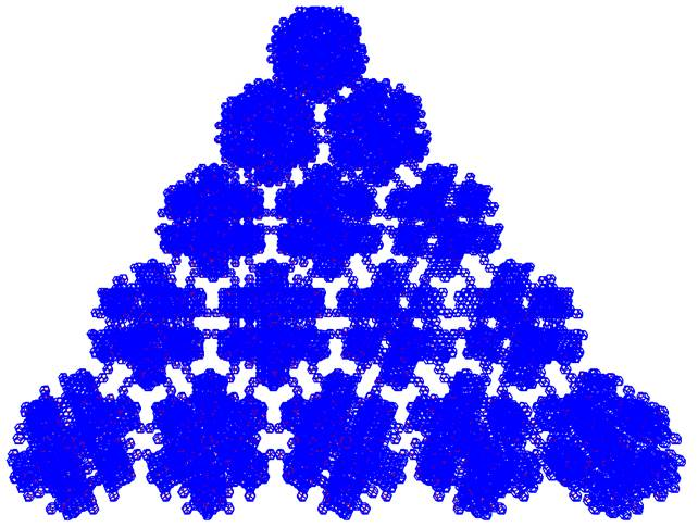 A második ikozaéder egy lapja dodekaéderekkel építve